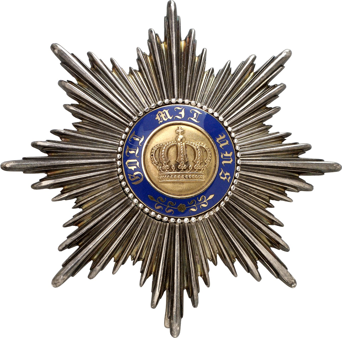 Königlicher Kronen-Orden (Preußen): Bruststern zur I. Klasse (3. Modell), Avers.